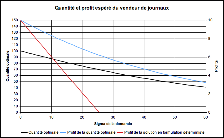 Ce graphique montre un exemple numérique du problème du vendeur de journaux confronté à une demande aléatoire.